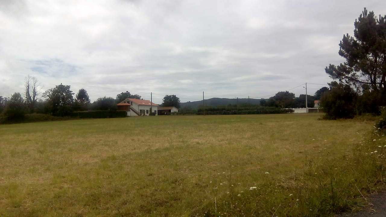 Vista do Foxo, O Val.